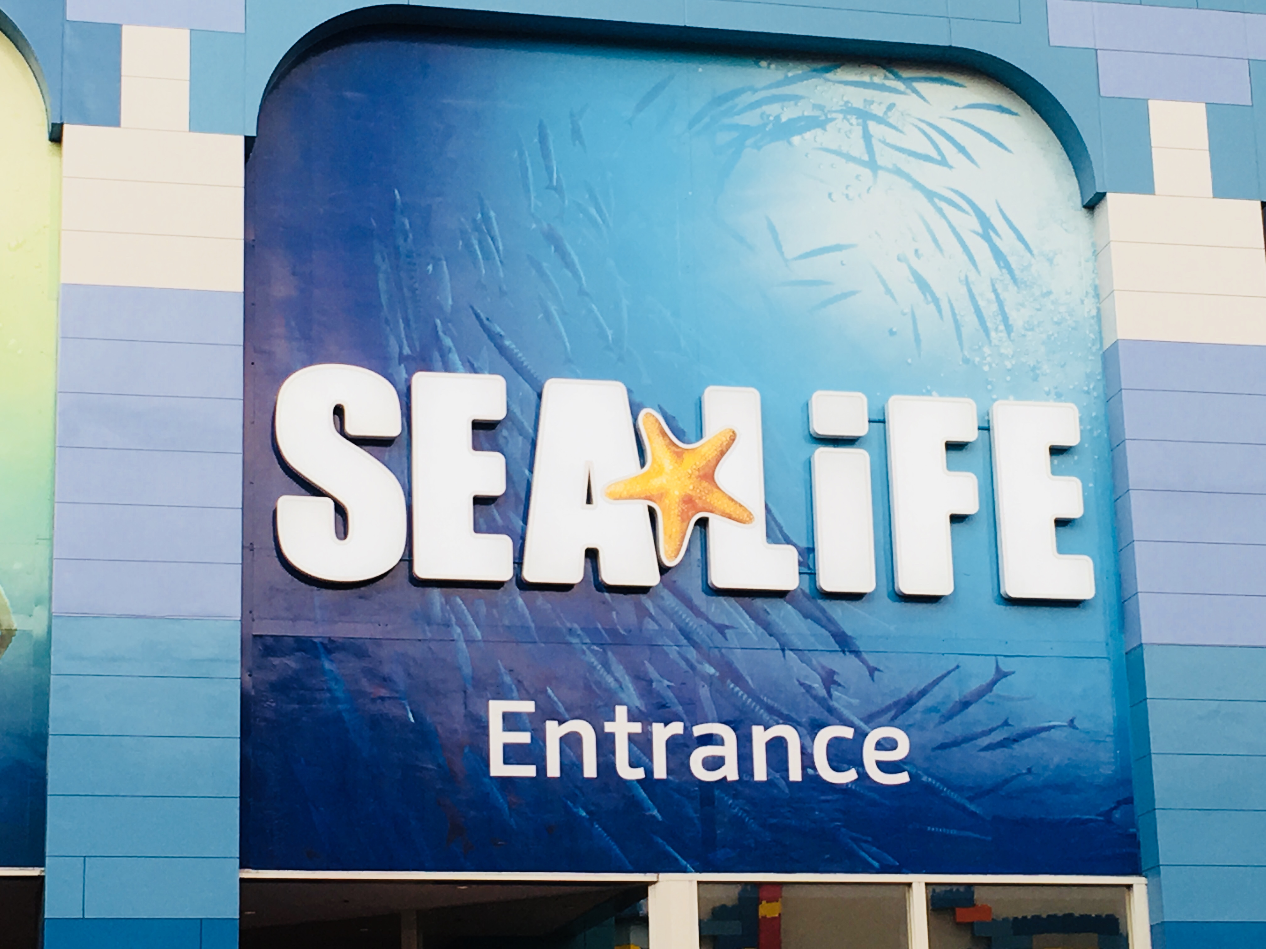 シーライフ名古屋2018年のロゴ